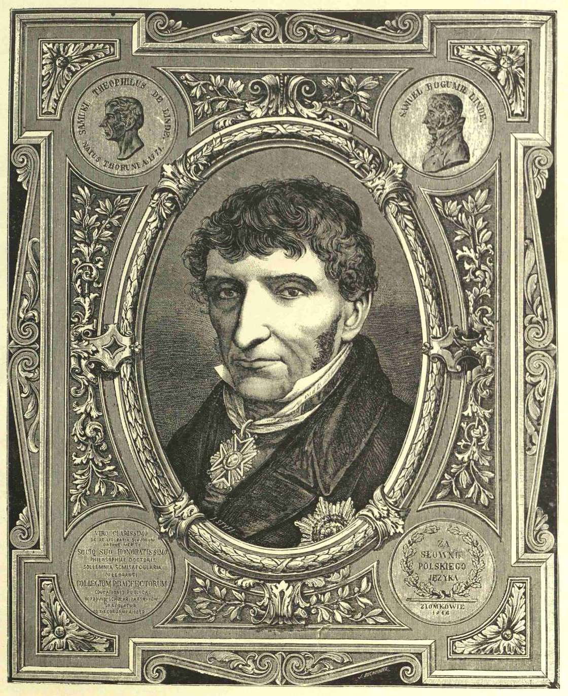 grafika z książki PL - Album biograficzne zasłużonych Polaków wieku XIX t.1 publikacja Marii Chełmońskiej Warszawa 1901